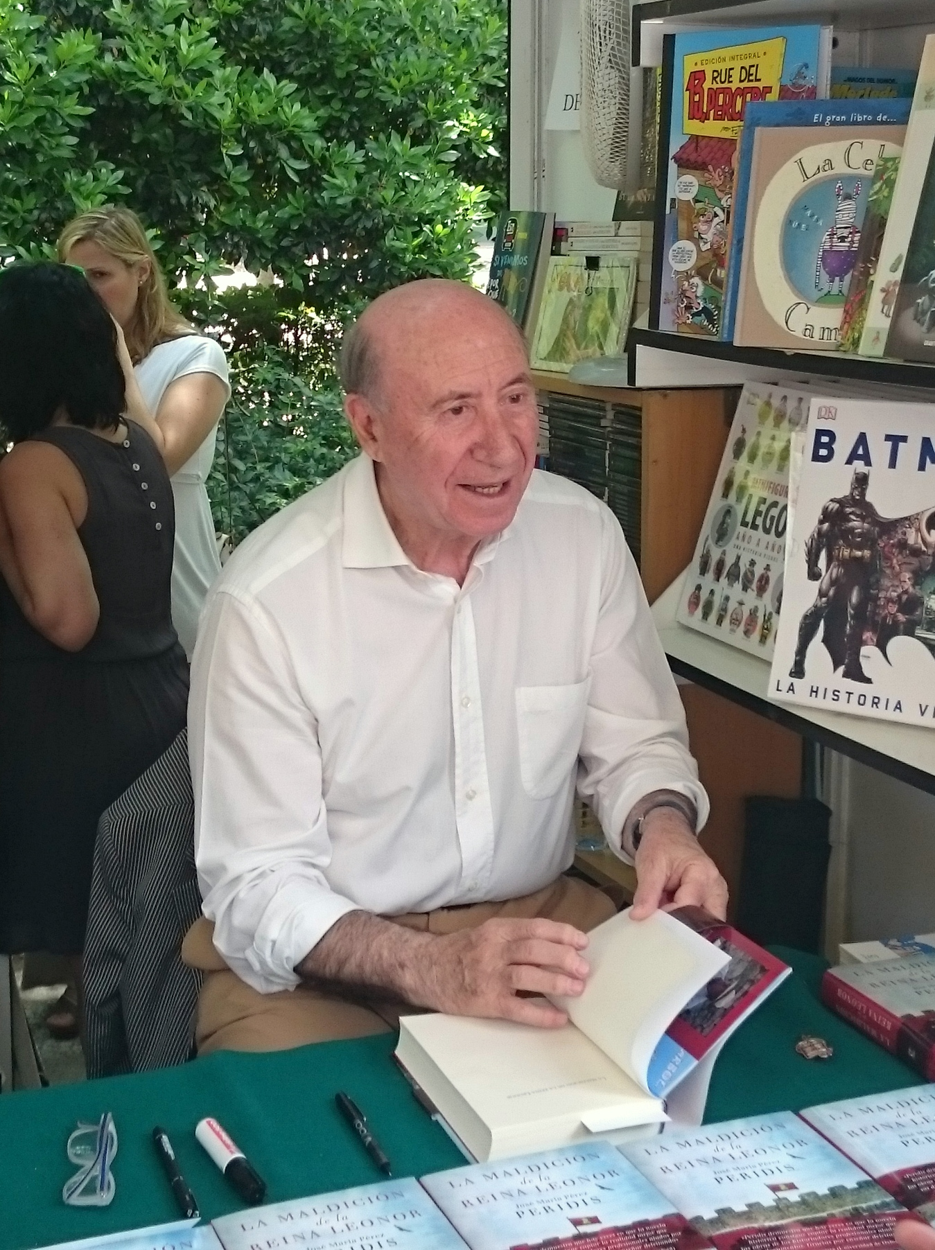 Peridis en la Feria del Libro de Madrid de 2016